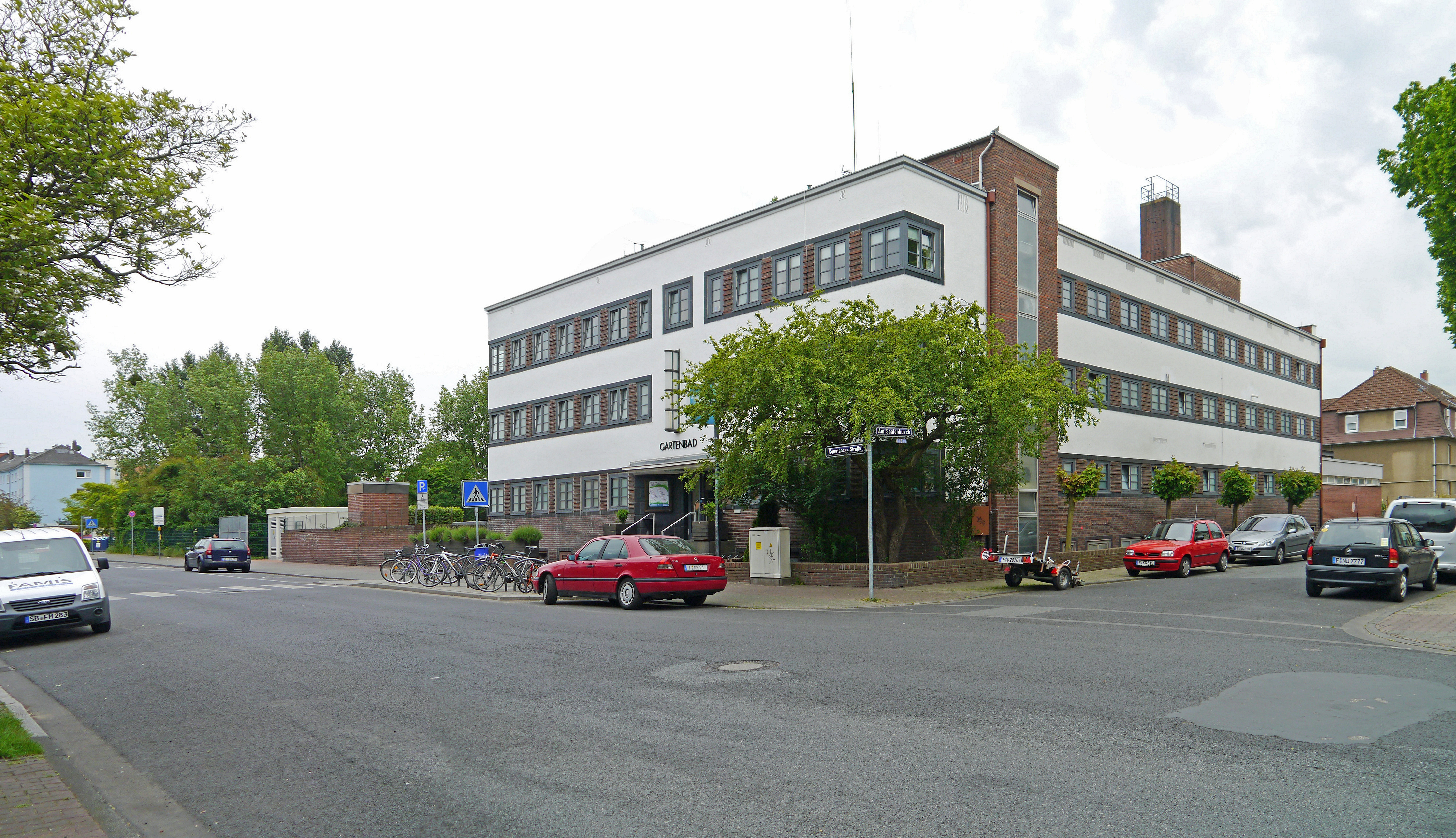 Das Gartenbad an der Konstanzer Strasse (Ecke Am Saalenbusch) in Frankfurt am Main - Fechenheim.